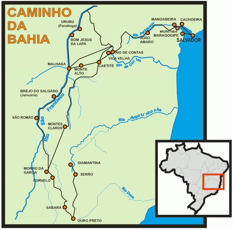 Mapa das estradas reais na Bahia - até séc. XIX.